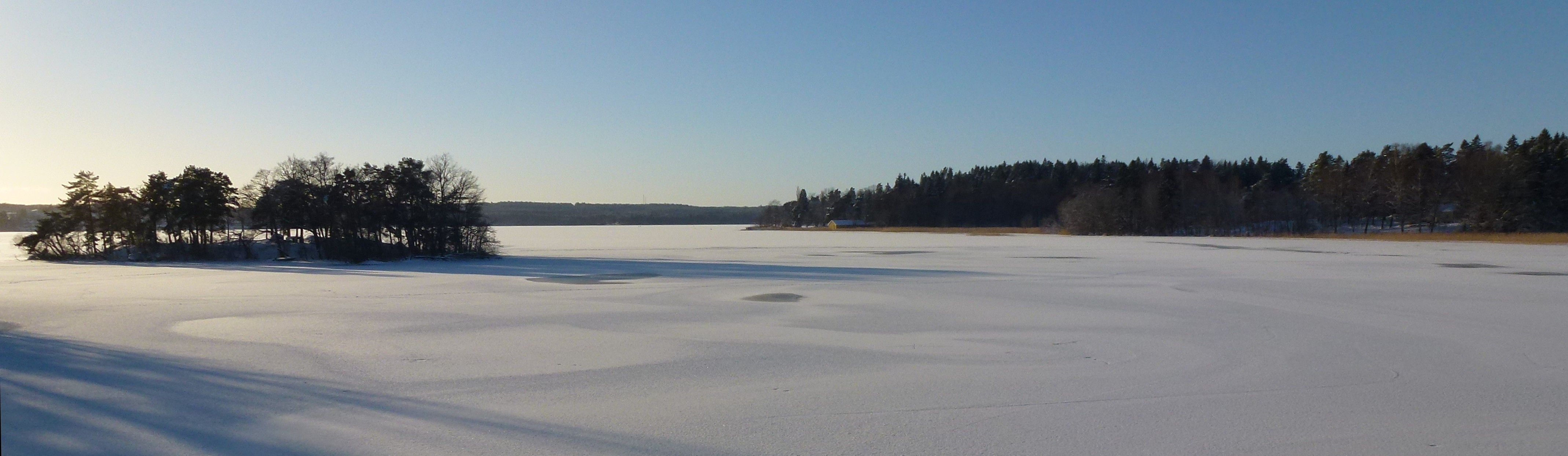 Lullehovssundet med Kaninholmen, vy mot sydväst